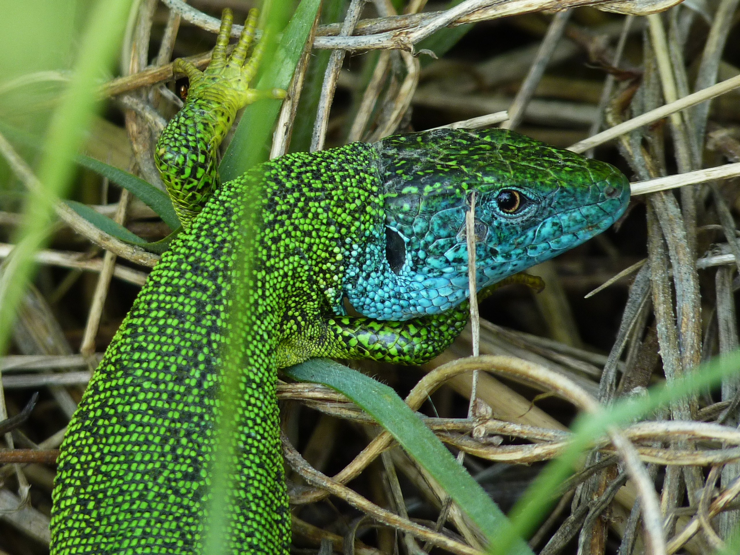 Smaragdeidechse